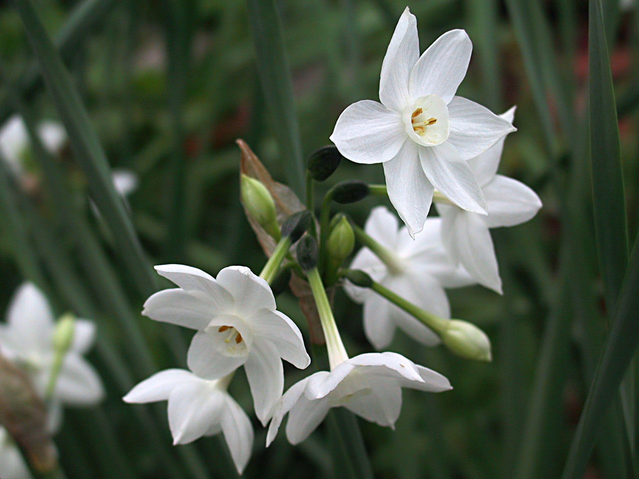 NarcissusNarcissus